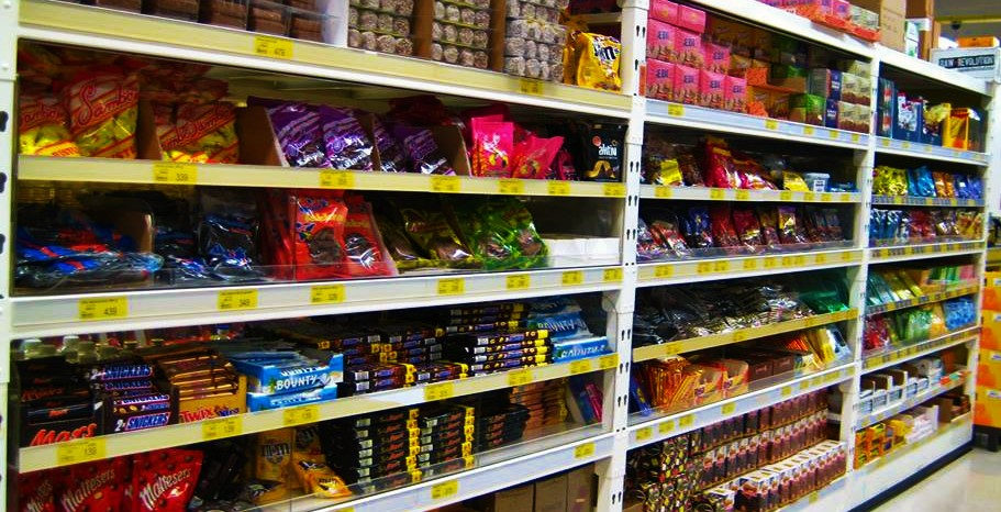 godis hylla